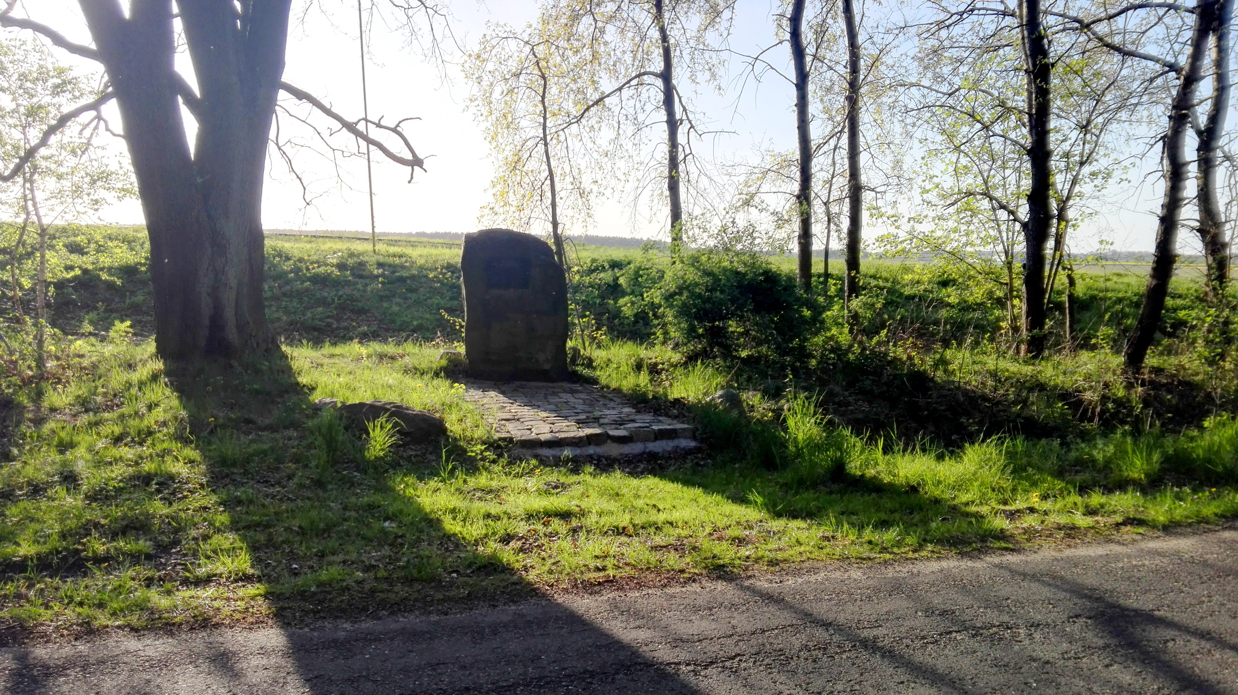 Polska Nowa Wieś, Pomnik katastrofy lotniczej w dniu 16.09.1984 r. przy drodze prowadzącej do lotniska